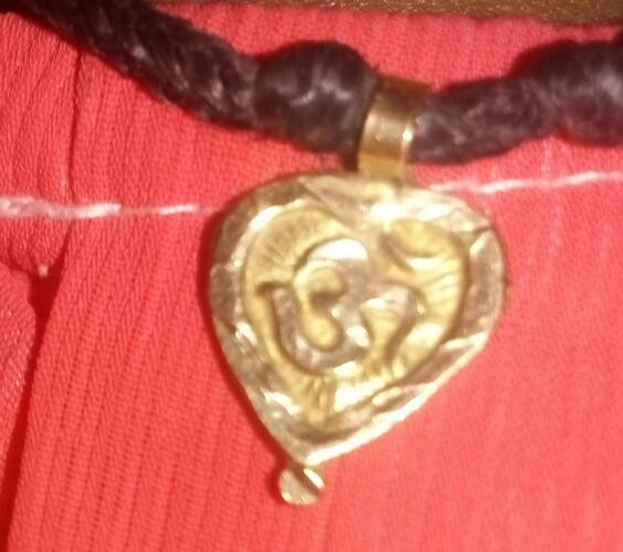 बदाम दागिना